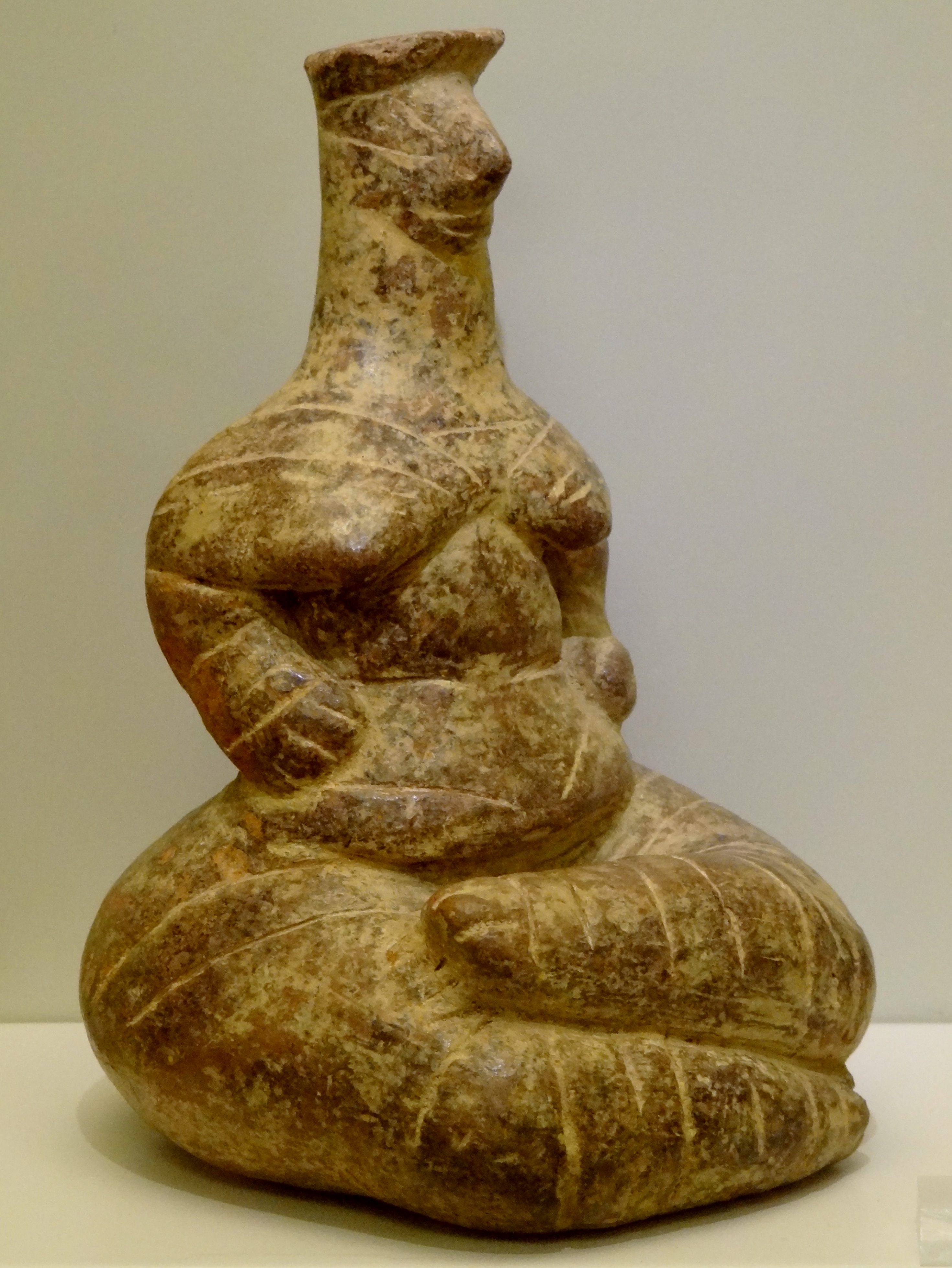 Sitzende weibliche Tonfigur mit kräftigem Gesäß, auf weibliche Fruchtbarkeit deutend (Mittel- bis Jungsteinzeit, 5800–4800 v. Chr.) aus Kato Chorio (Ierapetra), ausgestellt im Archäologischen Museum Iraklio, Kreta, Griechenland